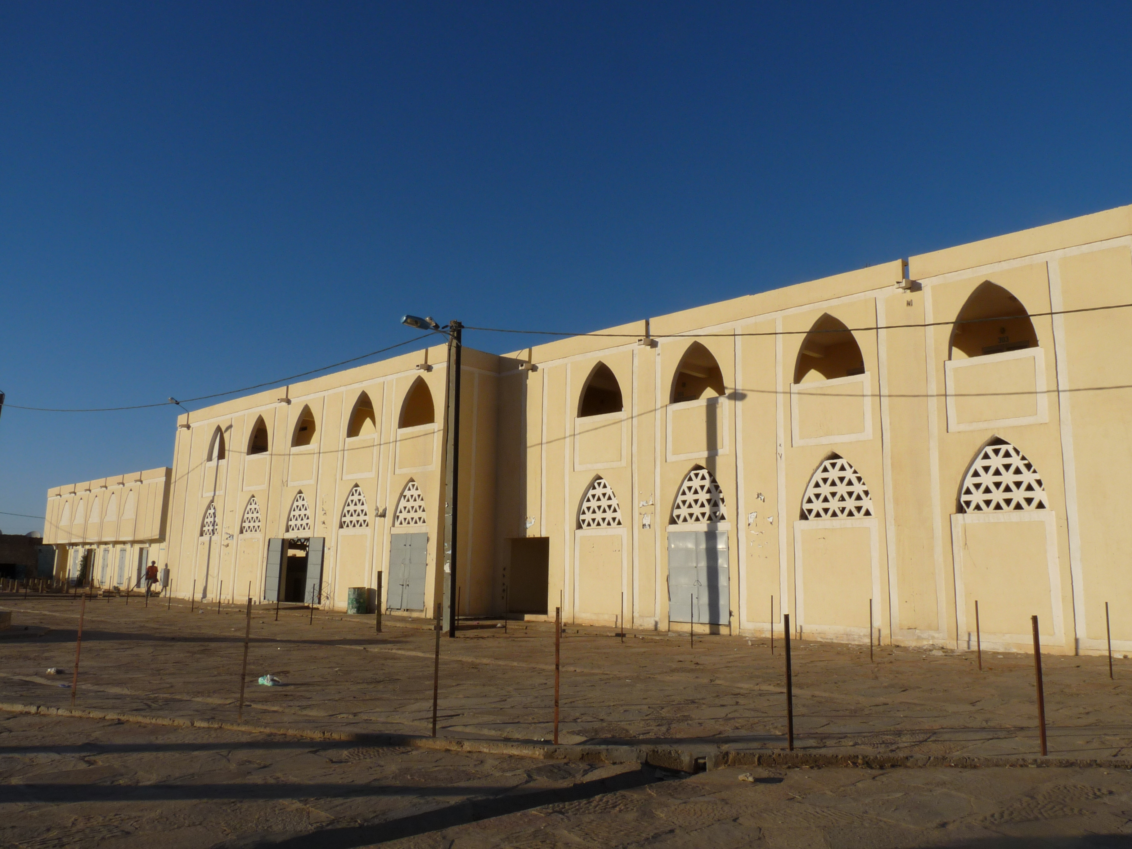 Marché d'Atar (Mauritanie)